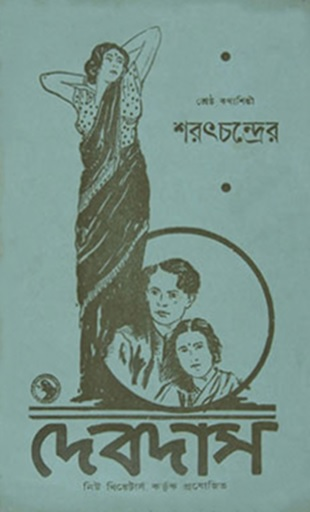 Brochure publicitaire de Devdas (P.C. Barua 1935)